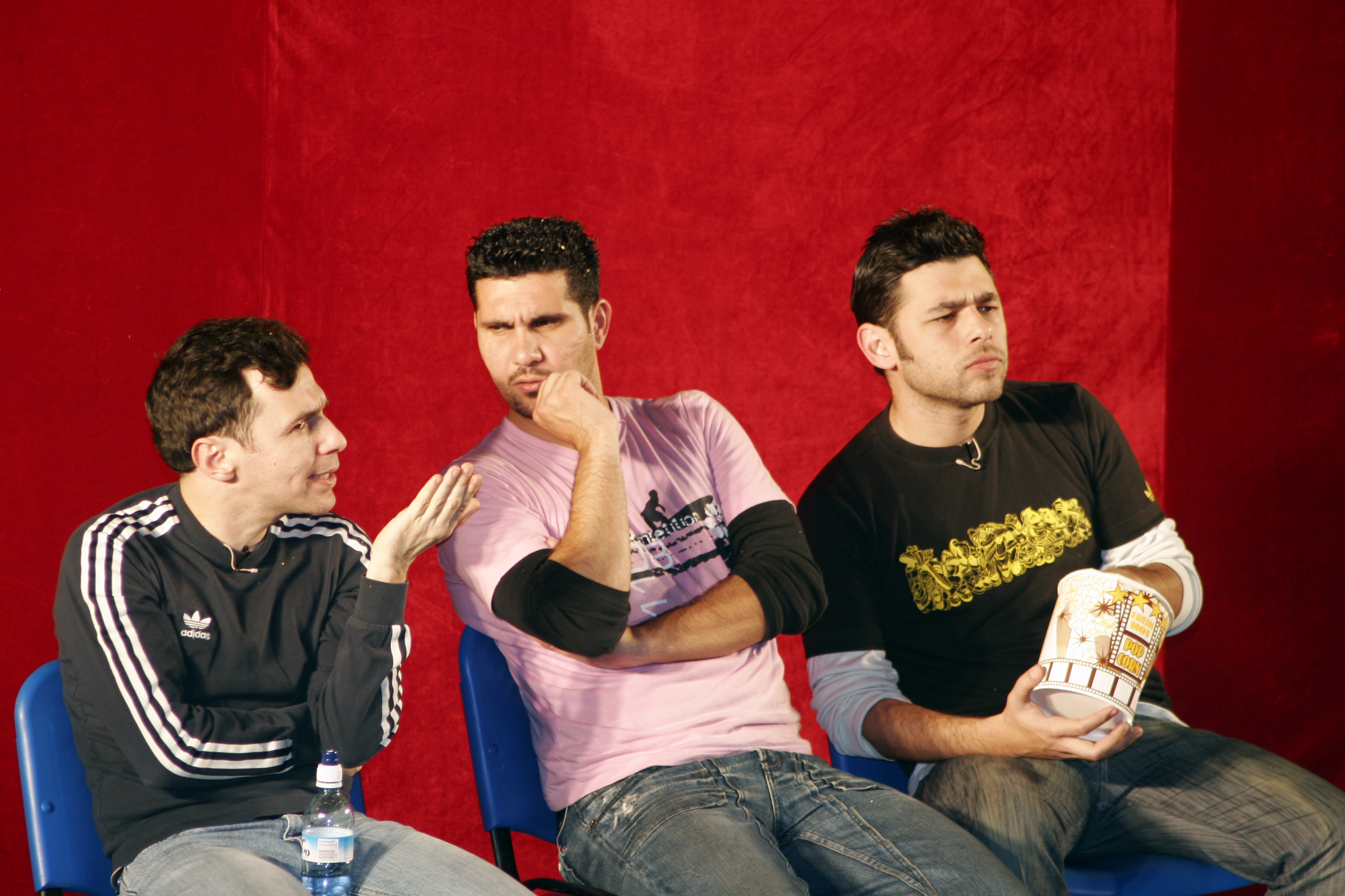 Prozak Trio